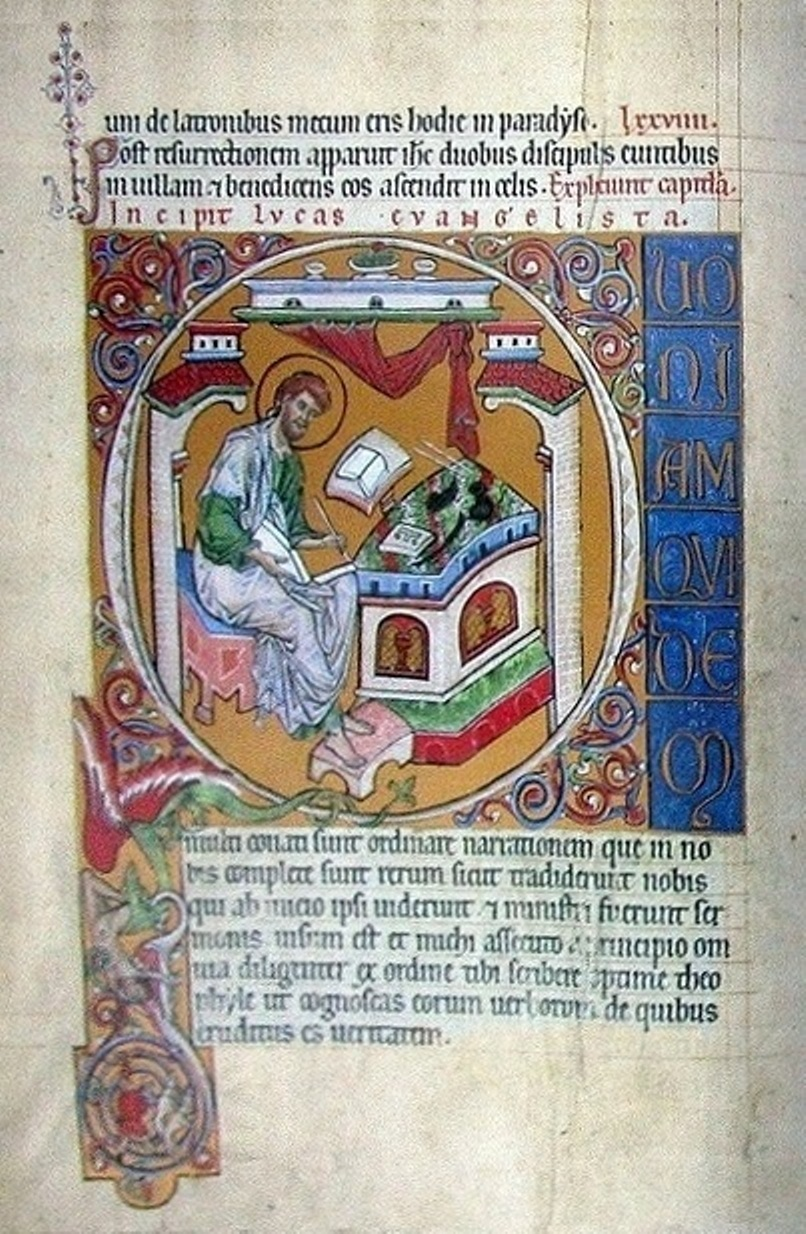 Goslarer Evangeliar, Anfang des Lukasevangeliums, Bild des Evangelisten